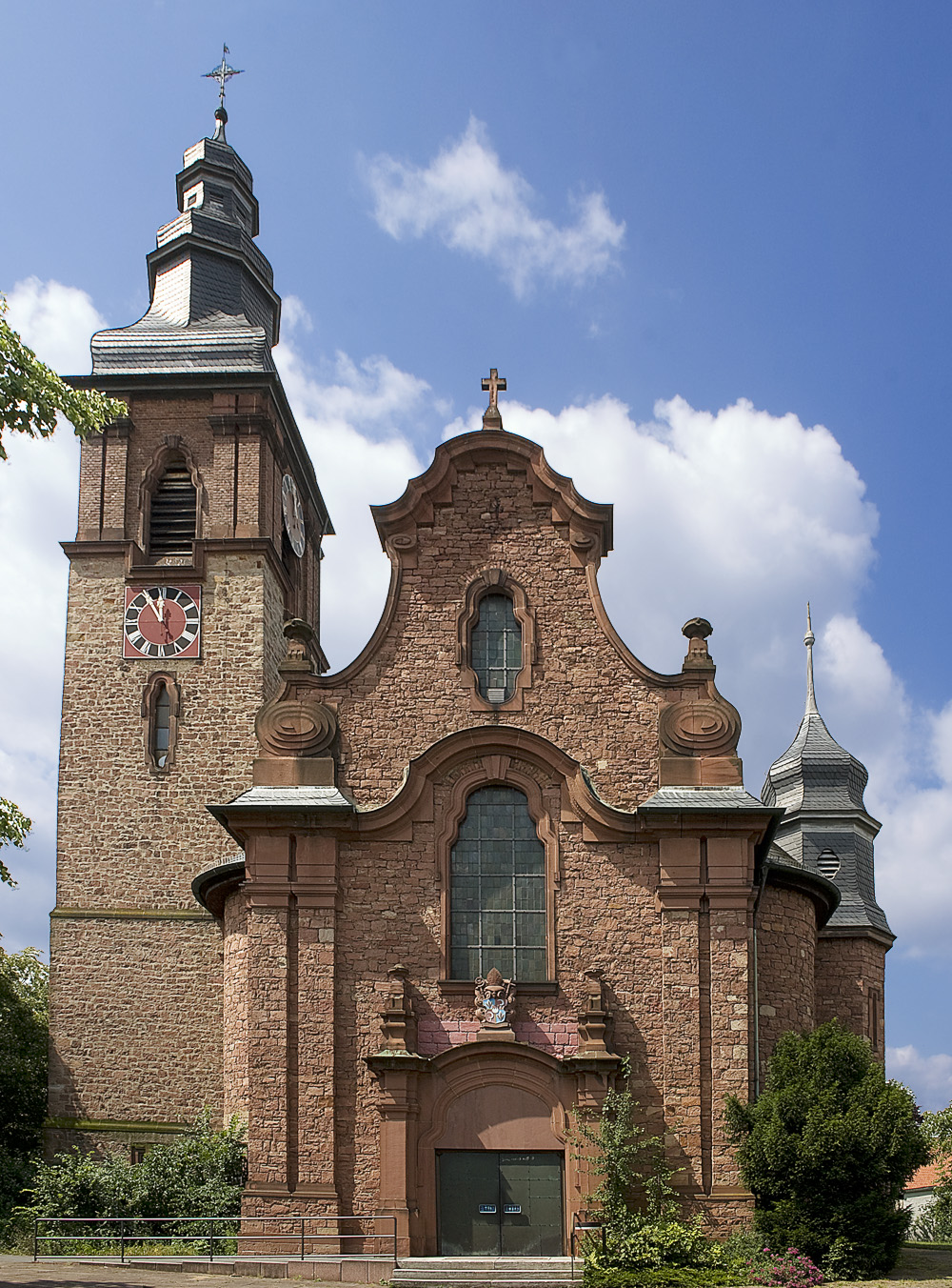 St.-Katharina-Kirche in Alzenau-Wasserlos, Bayern (Deutschland)